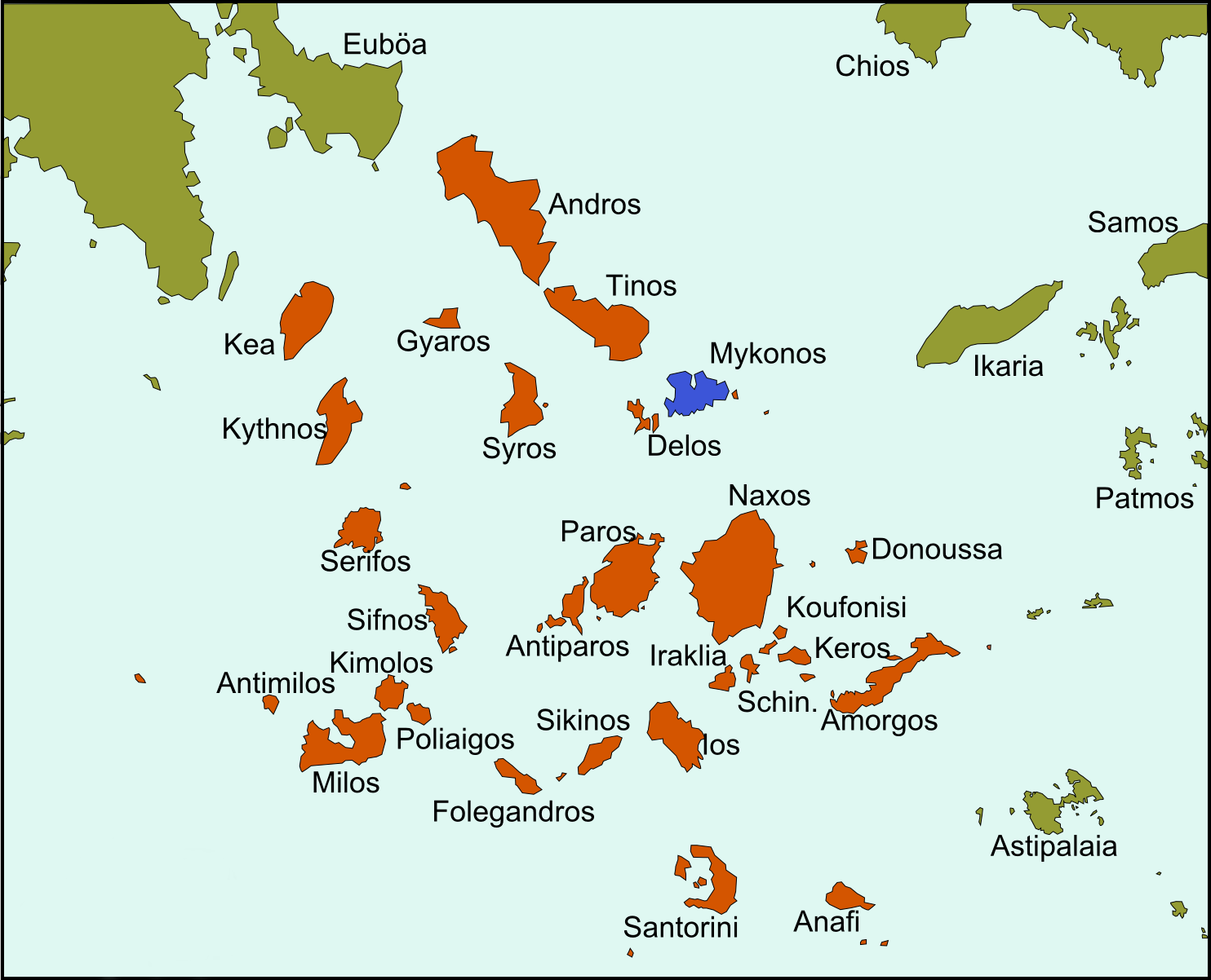 Lage der Insel Mykonos in den Kykladen